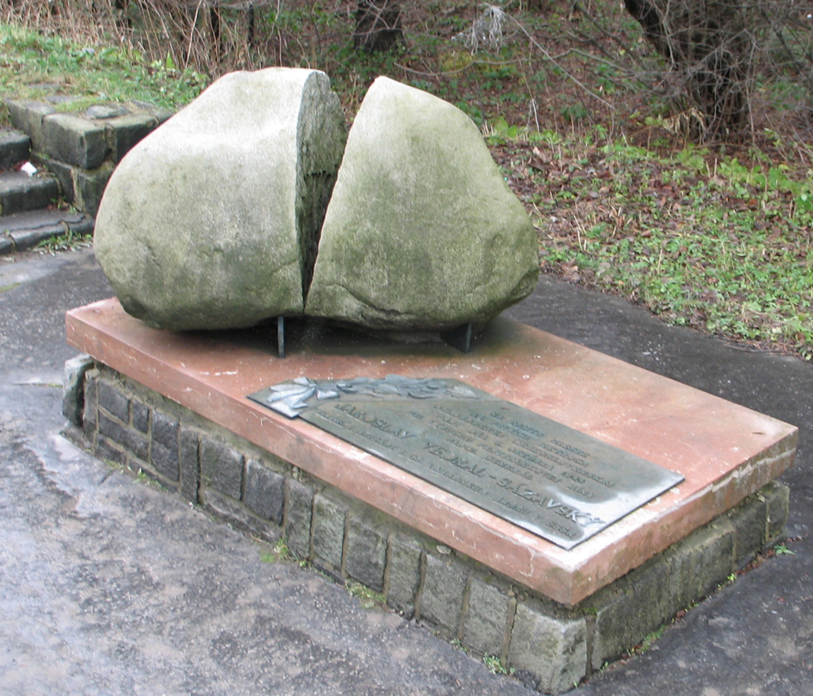 Pamätník pripomínajúci tragickú smrť generála Jaroslava Vedrala-Sázavského